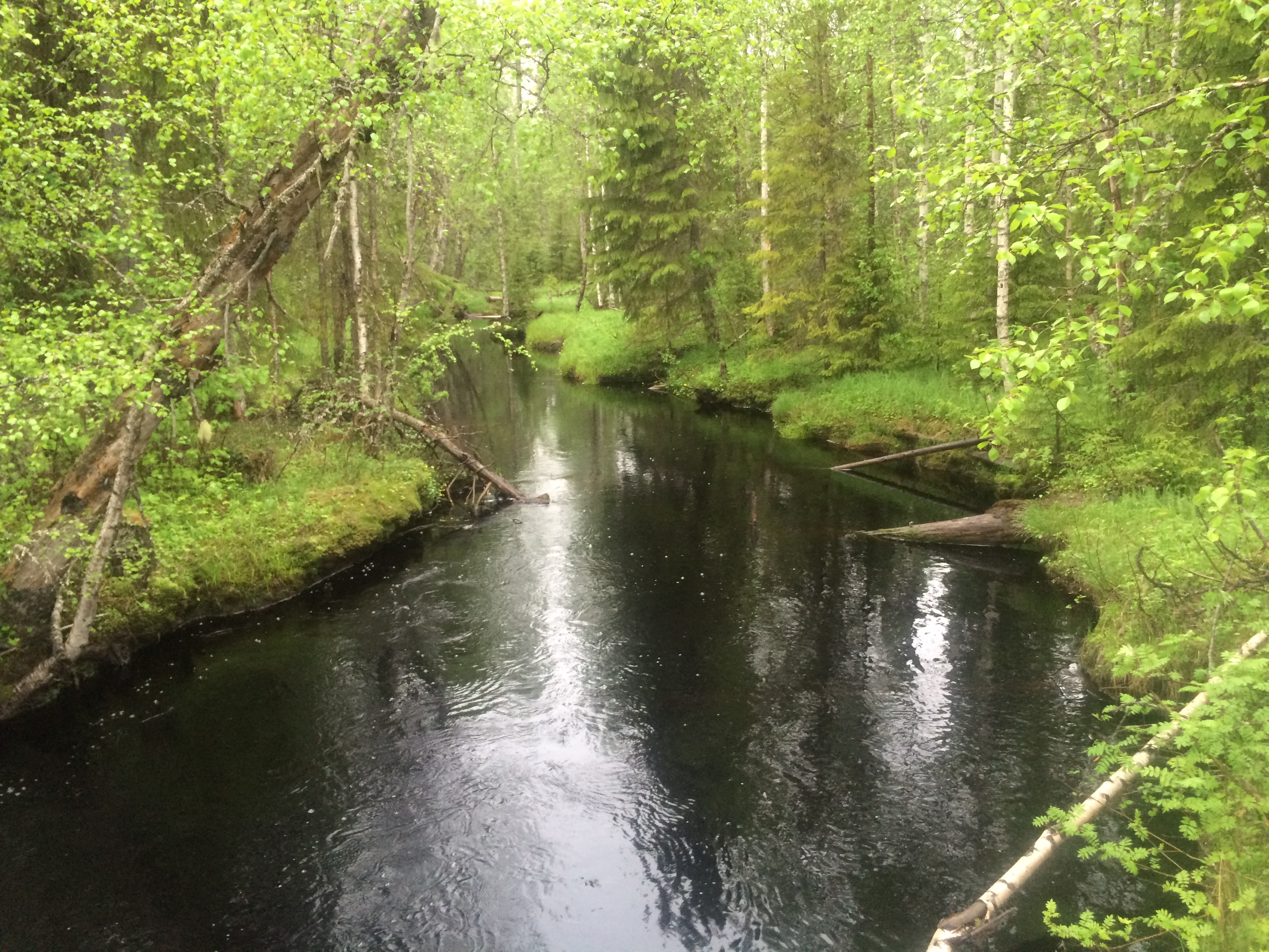 река Ронда